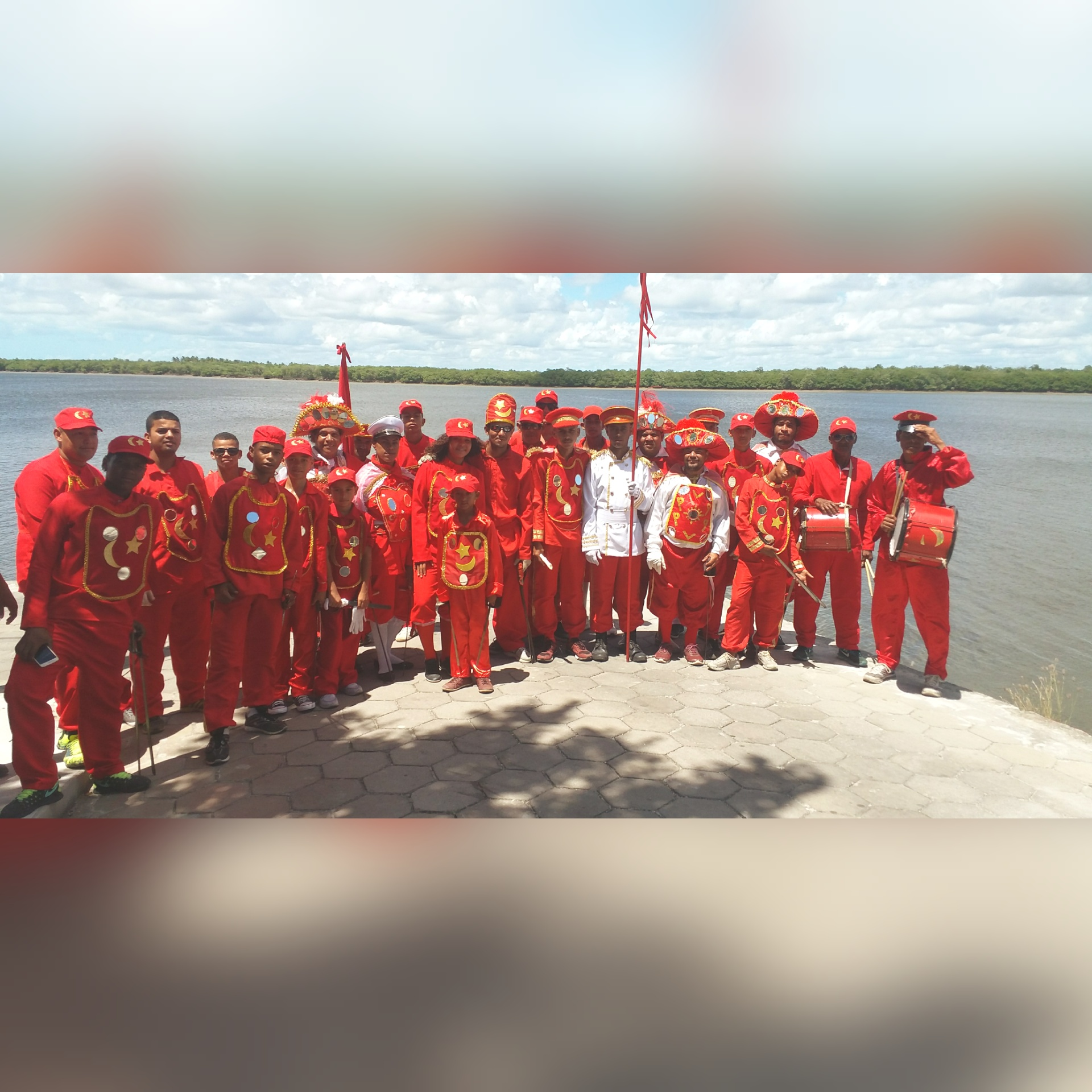 gdhjdjsj